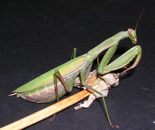 Mante religieuse femelle sur le point de pondre - Provence - France - praying mantis - manteidae - mantoptère - mantidés